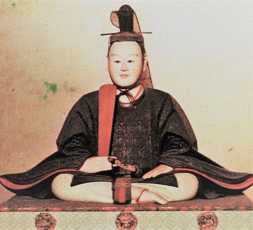 間部詮房の木像。